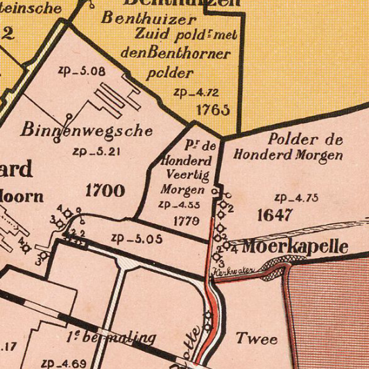 Honderdveertig Morgen